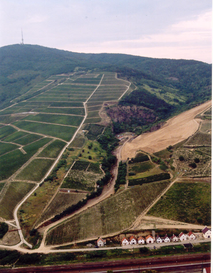 Tokaj-hegyalja - Hungary - Europe